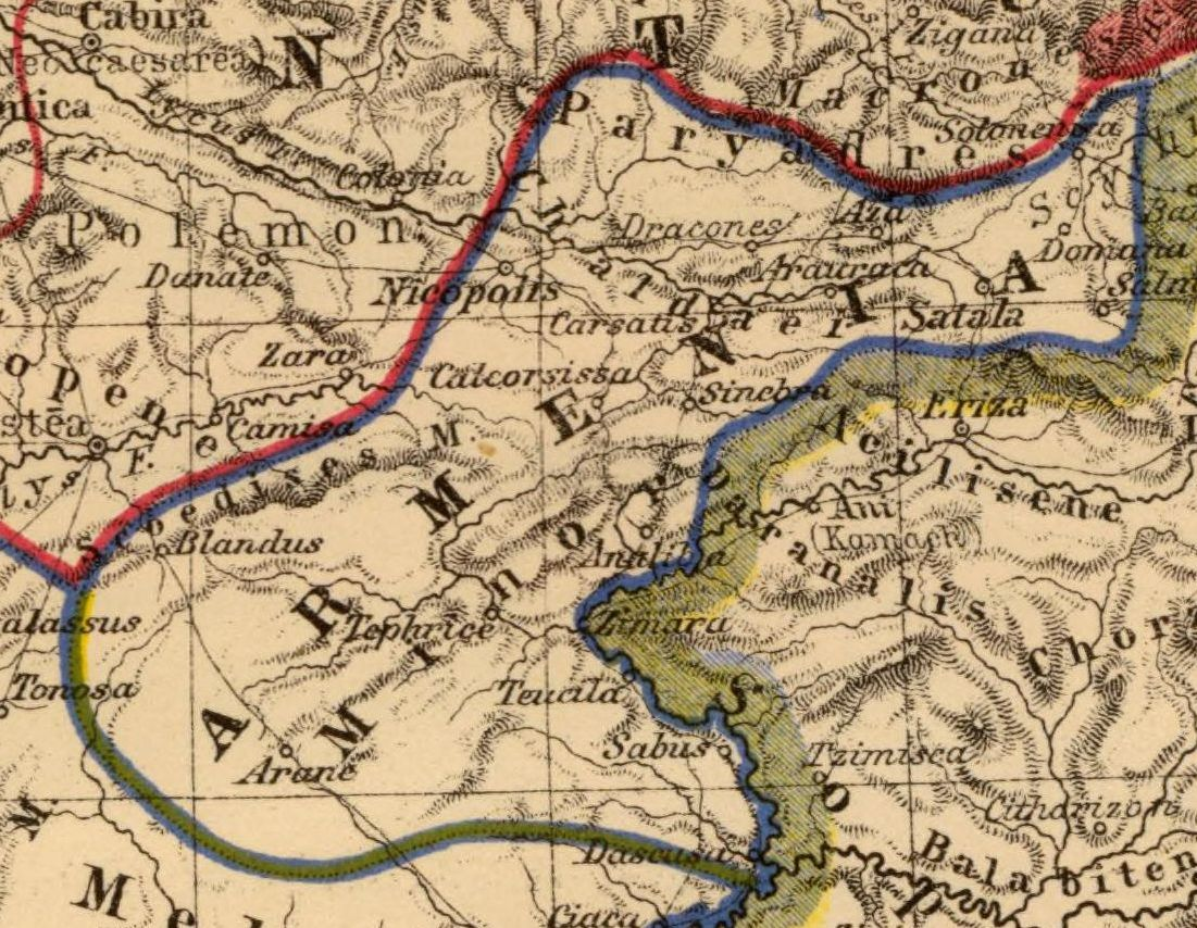 Armenia. Asia citerior. Auctore Henrico Kiepert Berolinensi. Geographische Verlagshandlung Dietrich Reimer (Ernst Vohsen) Berlin, Wilhemlstr. 29. (1903)